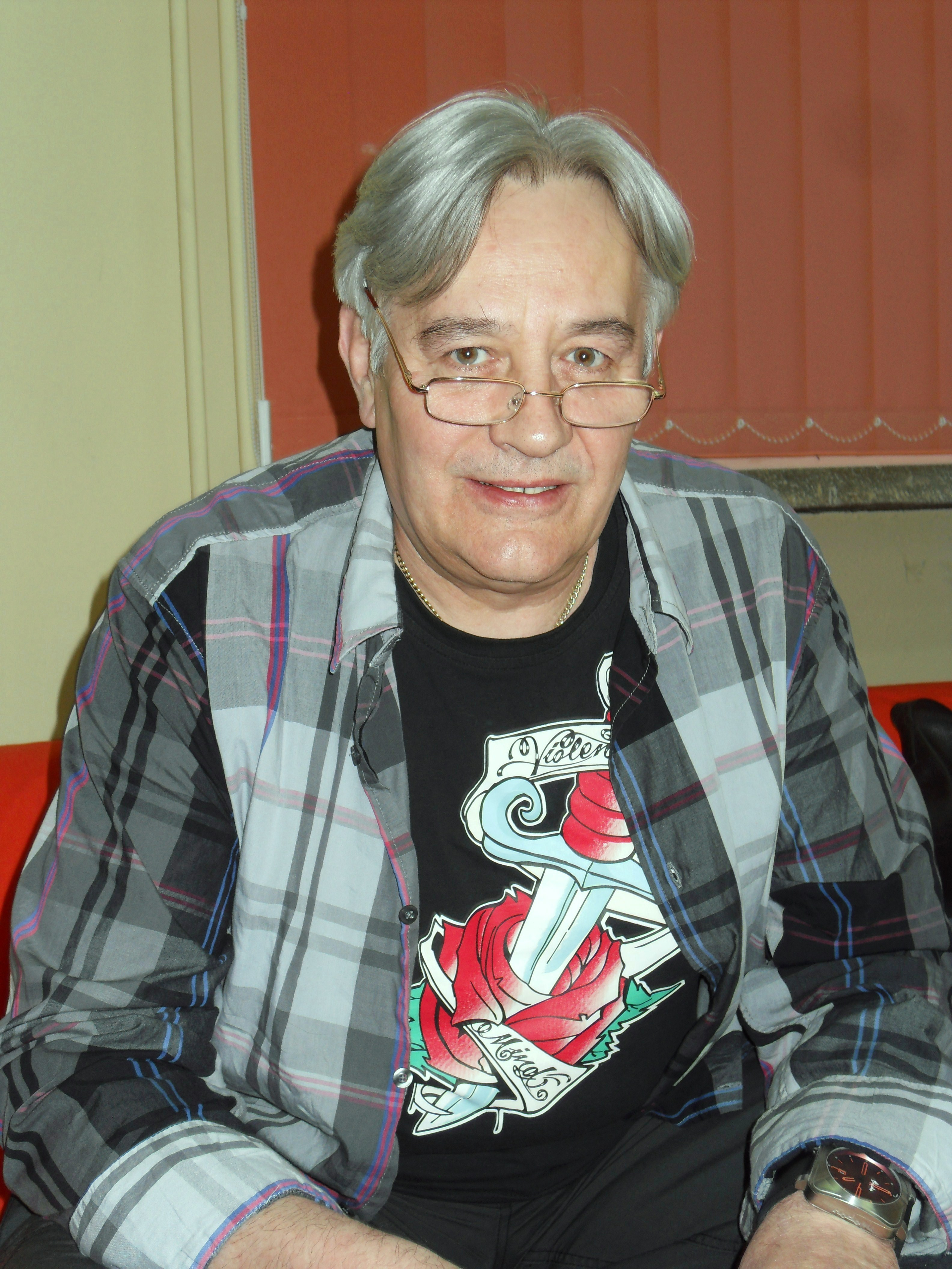 Mirosław Krawczyk, gdański aktor.